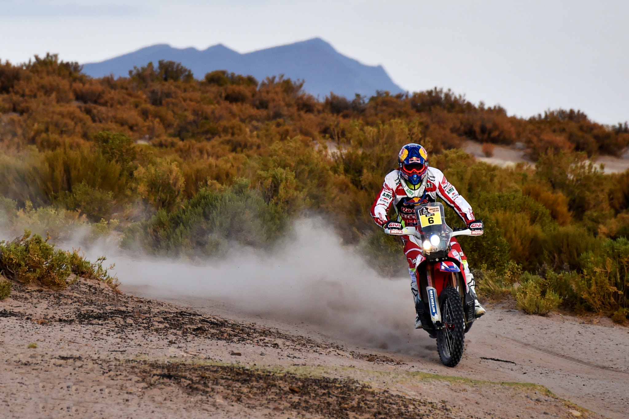 500px provided description: Joan Barreda en el Dakar 2016. Joan Barreda es uno de los pilotos oficiales de AMV Asesores [#motorcycle ,#motor ,#motorsport ,#dakar ,#amv argentina ,#joan barreda ,#amv asesores ,#dakar 2016]